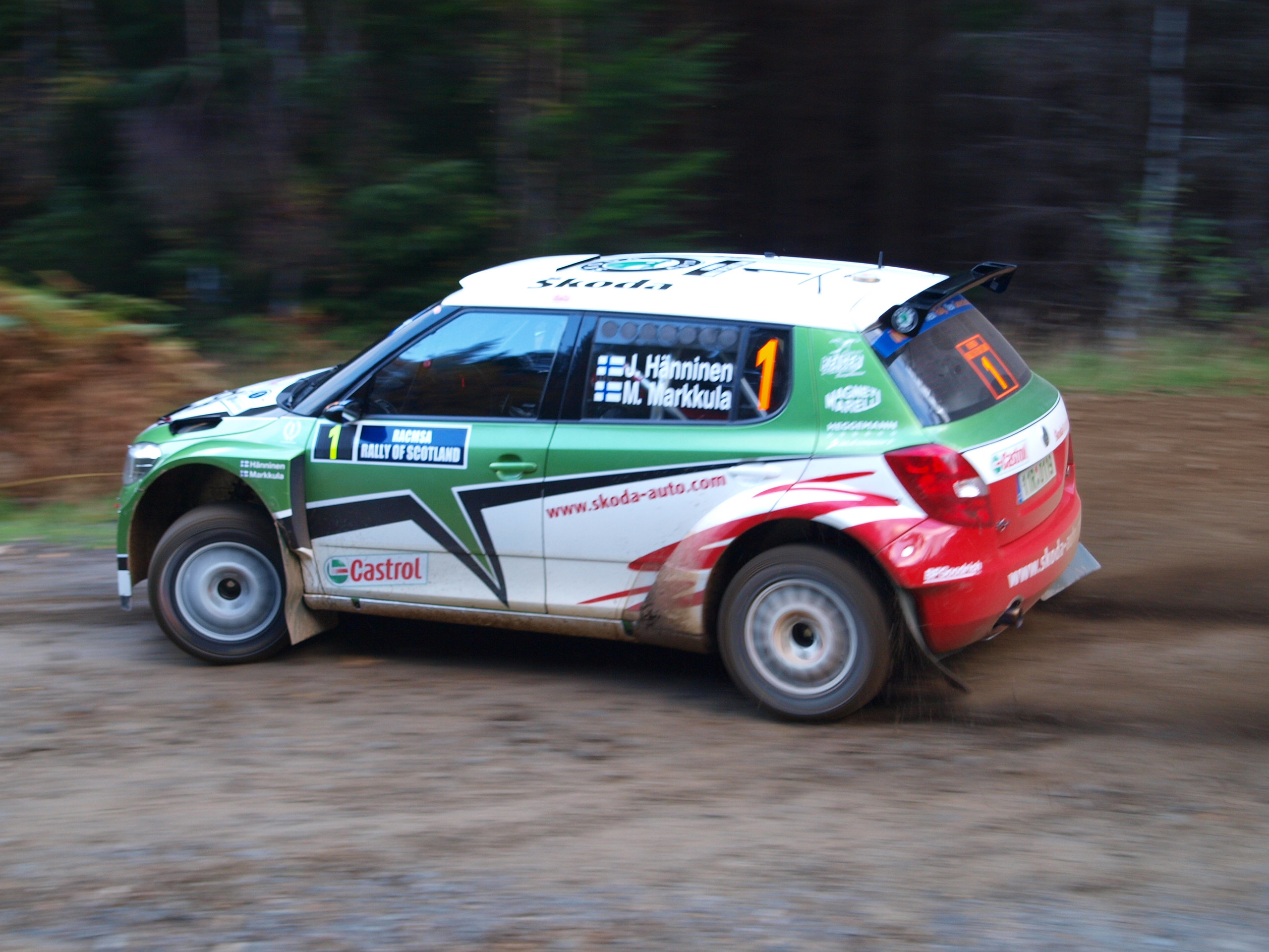 Juho Hänninen on SS4 Drummond Hill